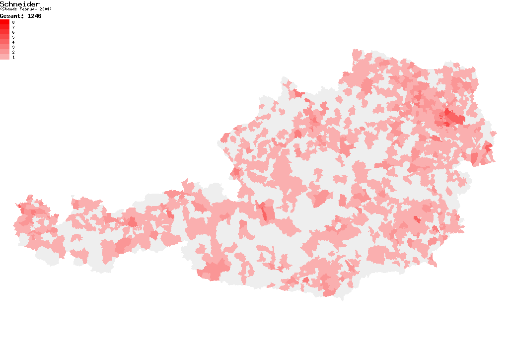 Verteilung des Nachnamens Schneider in Österreich nach dem Telefonbuch mit Stand vom Februar 2004